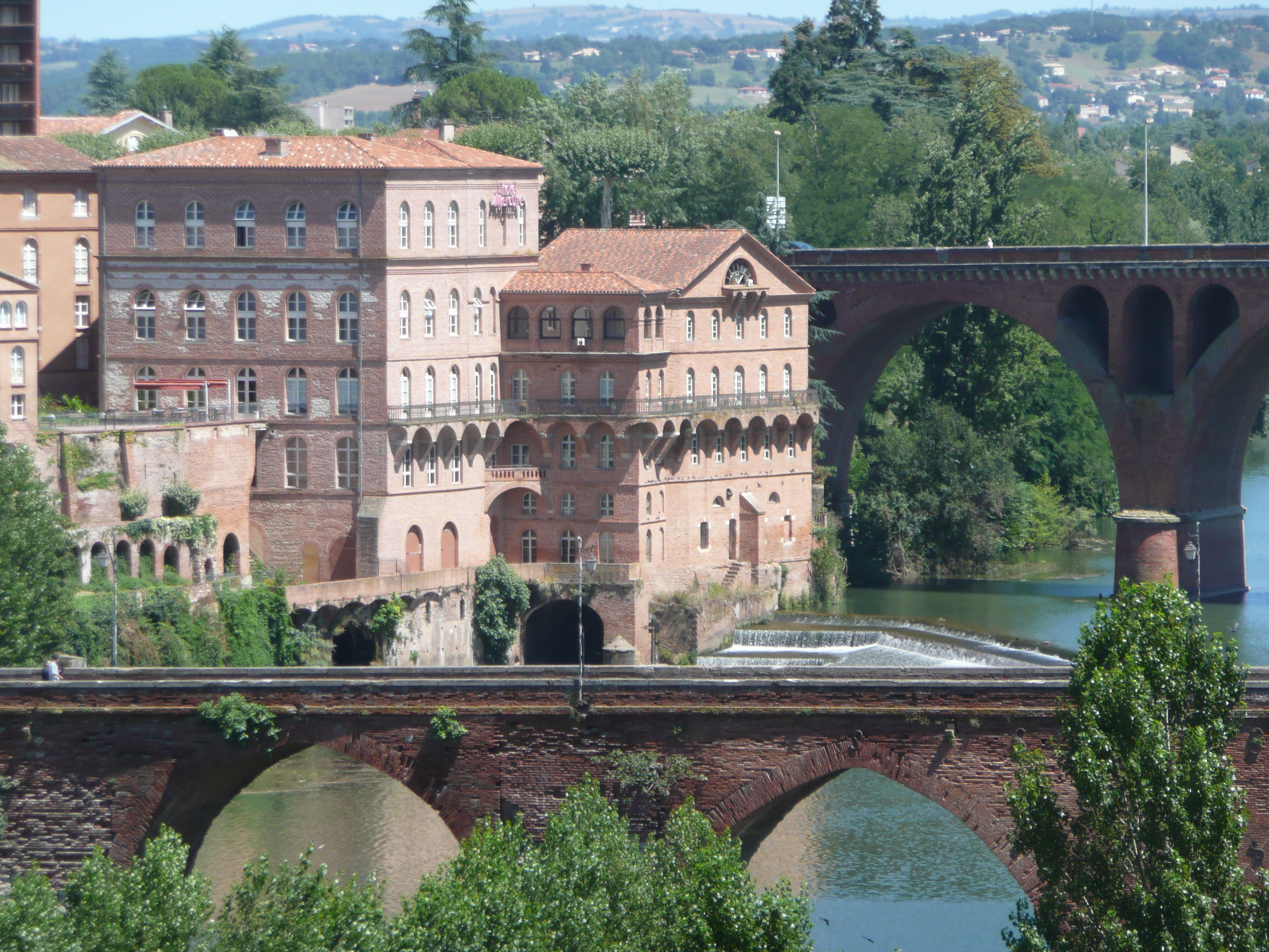 Moulins albigeois (ancienne vermicellerie d'Albi) - Albi (Tarn, France).